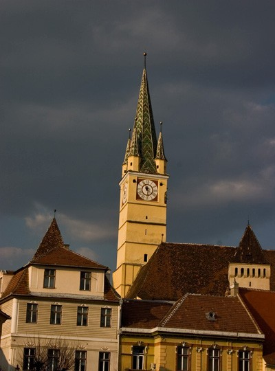 Der schiefe Turm der Margarethenkirche